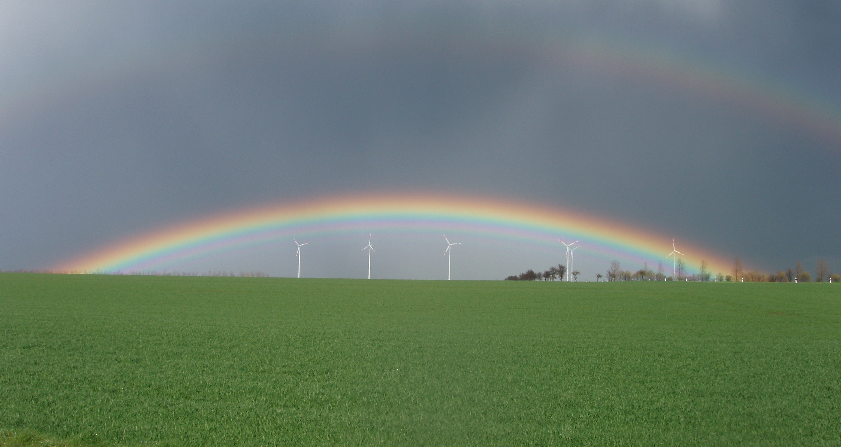 Ein Frühsommernachmittag in der Magdeburger Börde bei Wulferstedt - aufziehendes Unwetter von südosten - im Nu entsteht ein Regenbogen mit mehreren schwach ausgeprägten Nebenbögen. Der Hauptbogen trennt die obere dunkle, regengeschwängerte Wolkenwand von der milder bläulich getönten unteren. Es scheint, als trüge der Regenbogen mit Leichtigkeit die unendliche Schwere der Welt, wie es die Athena der Griechischen Götterwelt tat, als sie sah, wie sich Herakles dabei abmüht.